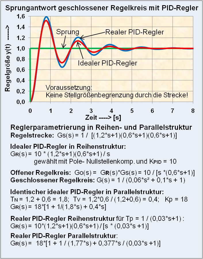 PID-Reglerparametrierung in Reihen- und Parallelstruktur.